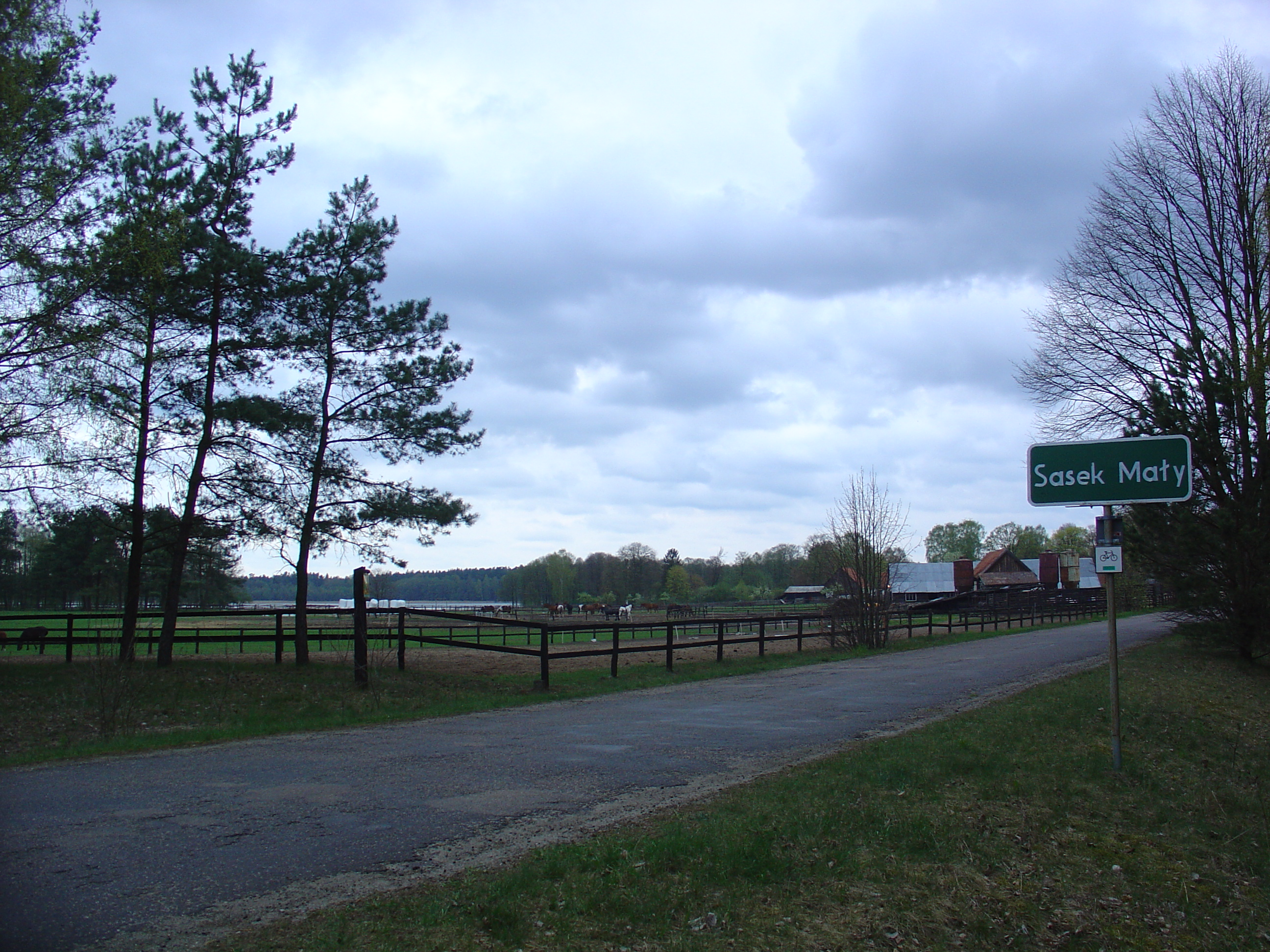 Sasek Mały (gmina Szczytno)